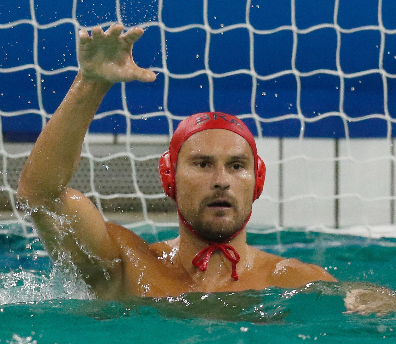 Seleção masculina brasileira de polo aquático vence a da Sérvia por 6 a 5 nos Jogos Olímpicos Rio 2016 no Parque Aquático Maria Lenk (Fernando Frazão/Agência Brasil)